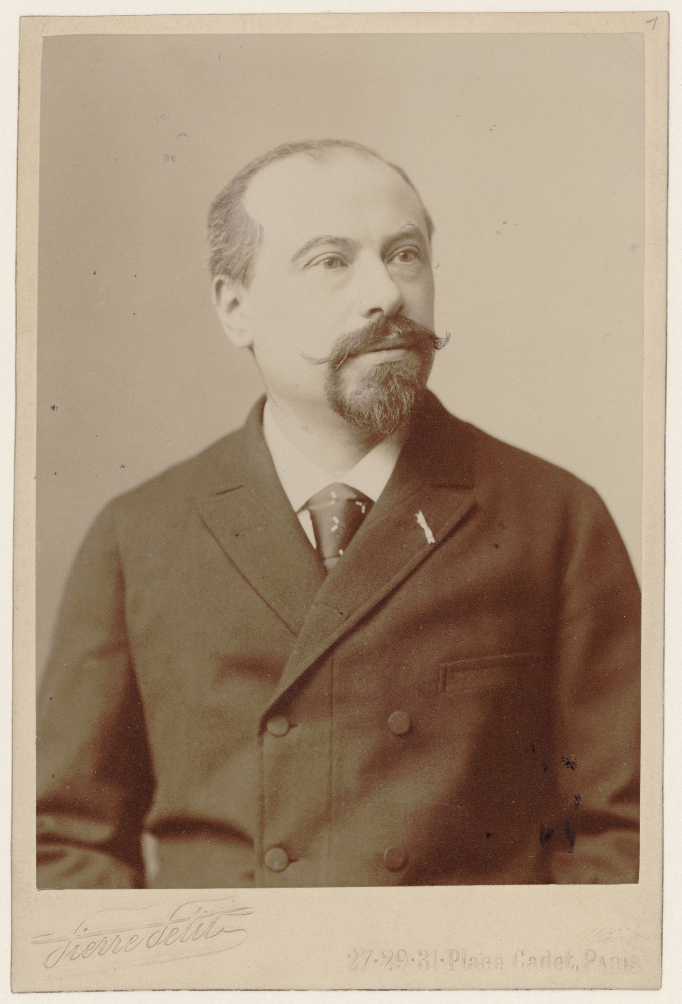 Constant Pierre photographié par Pierre Petit vers 1890